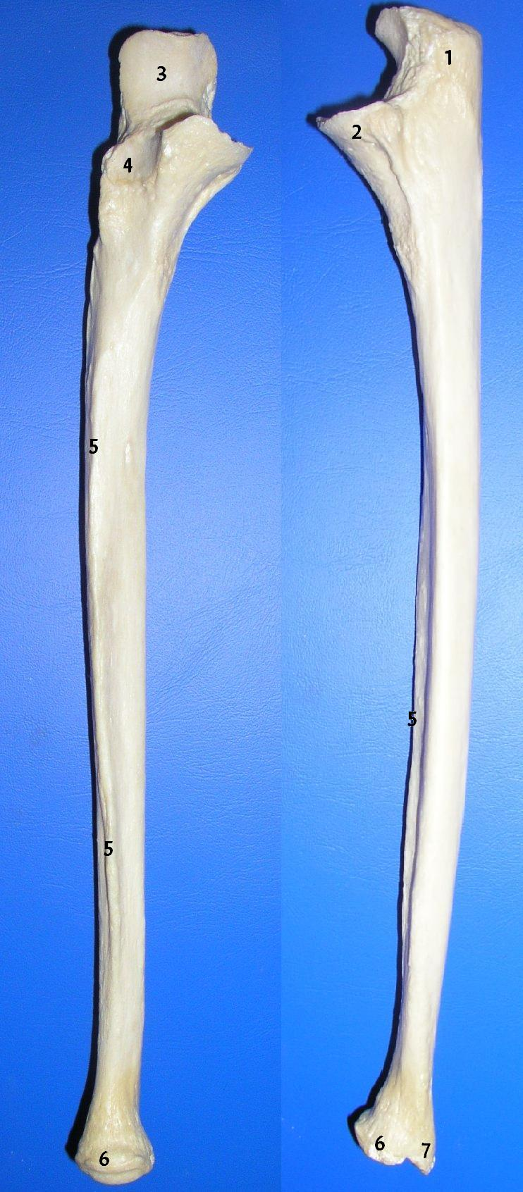 מקורות מתוך ויקישיתוף, נערכו על ידי והועלו מחדש.